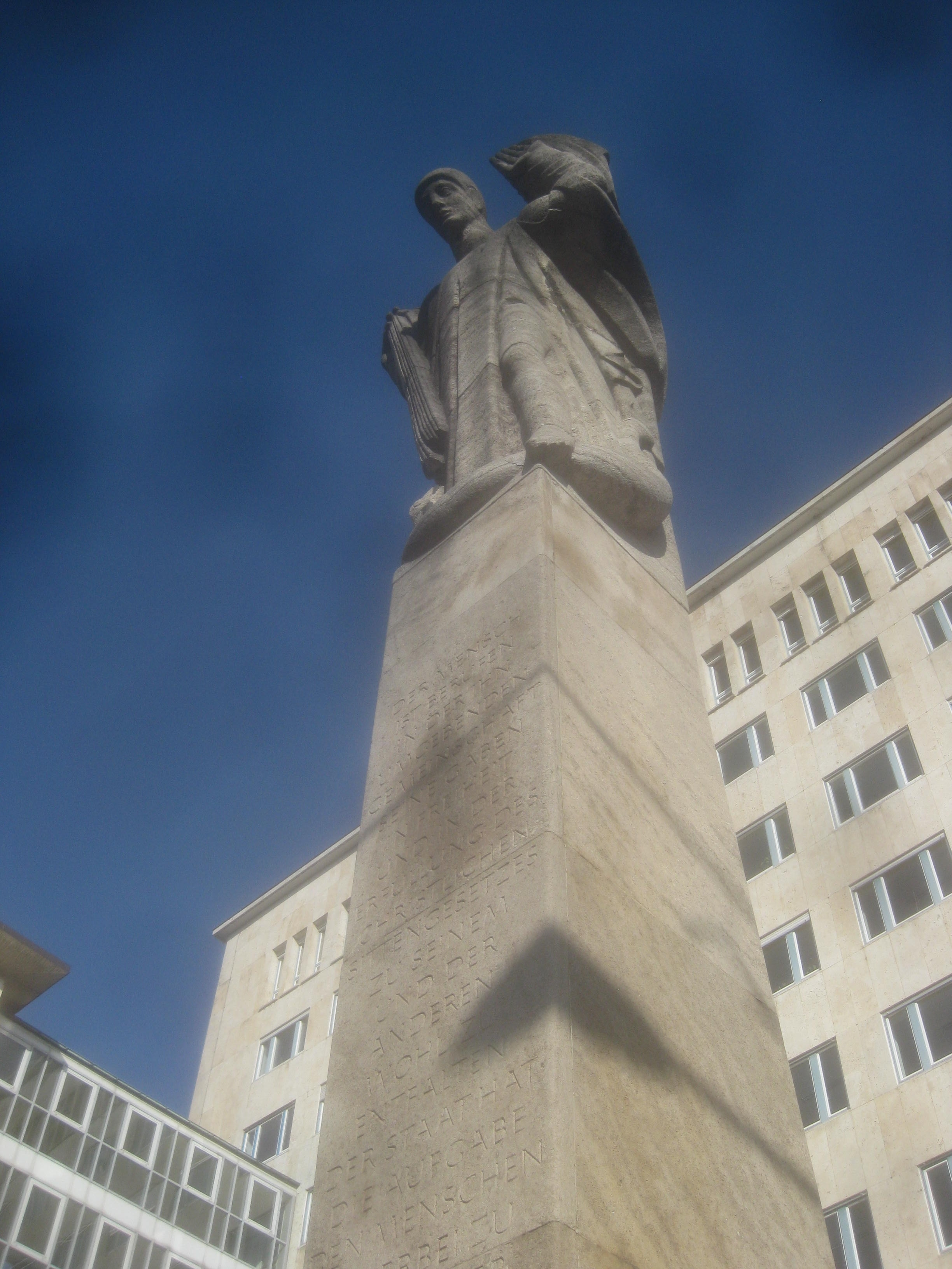 Verfassungssäule von Hermann Brachert, Landgericht Stuttgart, Urbanstraße 18.